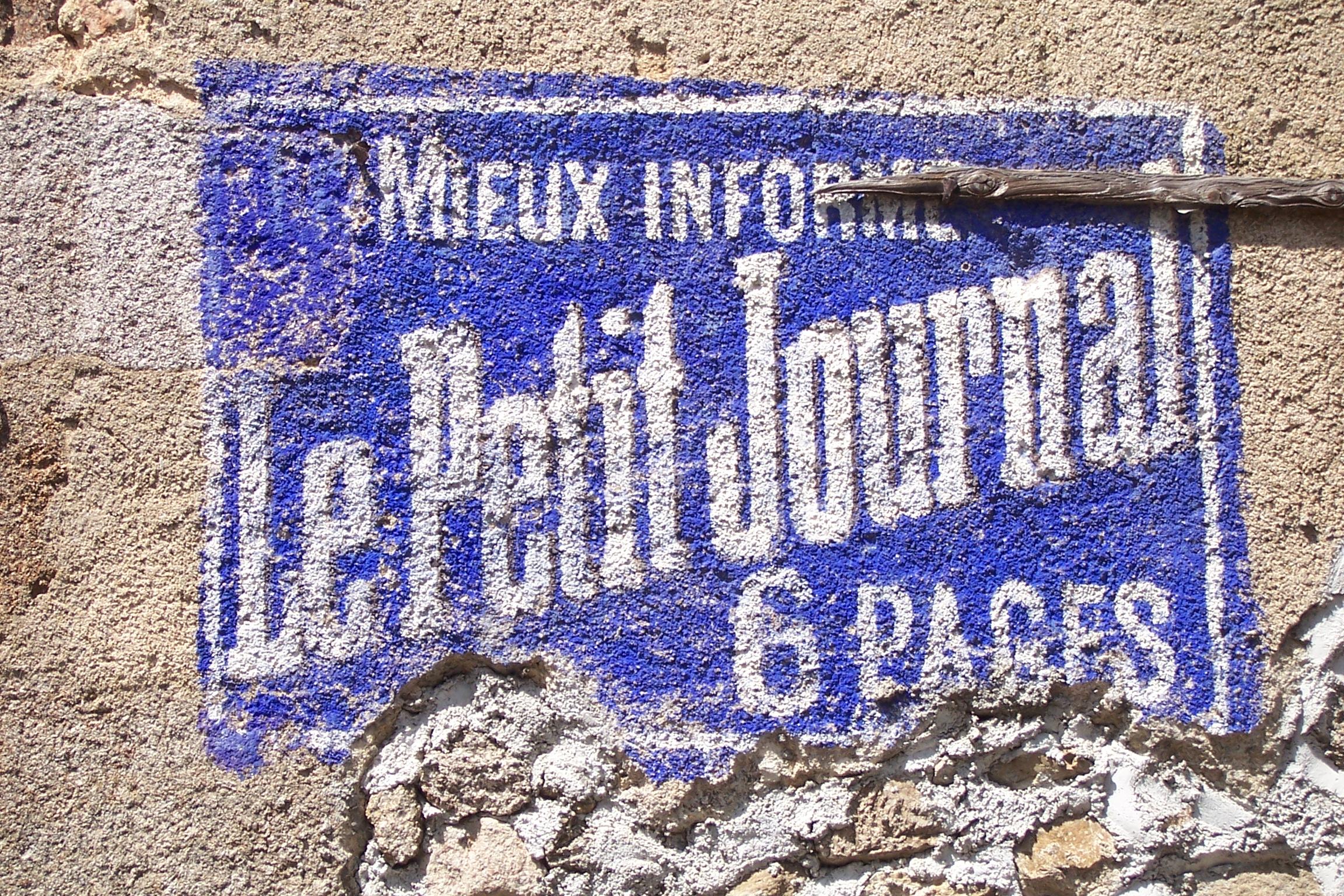 Publicité peinte sur un mur pour "Le petit journal"